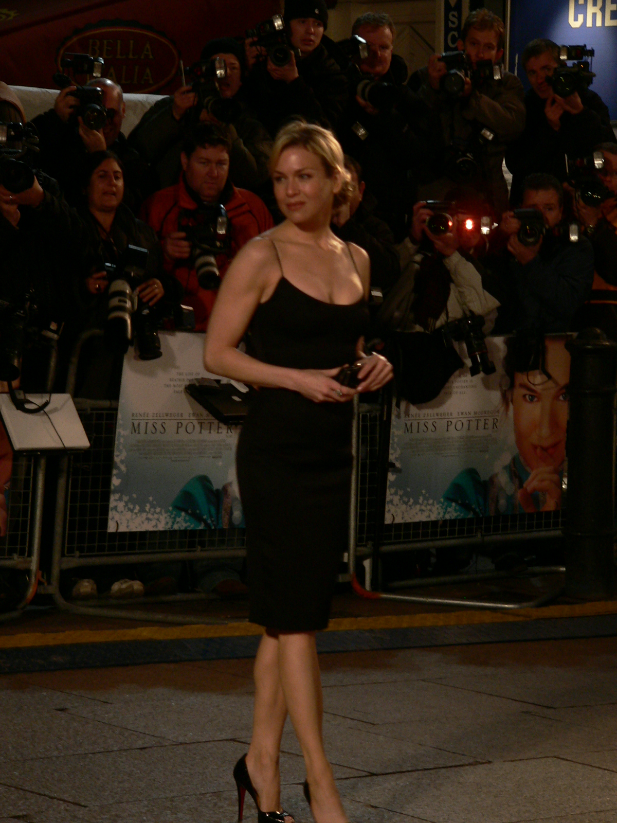 Renée Zellweger